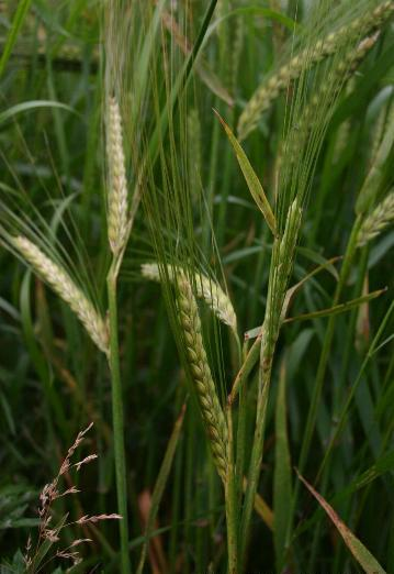 Hordeum vulgare